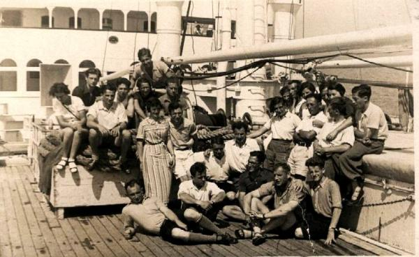 הלייה לארץ הייתה על אוניות .המסע ארך כמה שבועות והאוניה הייתה מבקרת בכמה נמלים של ארצות שונות.בקרב העולים נוצרו יחסי חברות ואלו שבאו כקבוצה מאורגנת שמרו על ההווי המיוחד של הקבוצה- עולי השומר הצעיר על אוניה